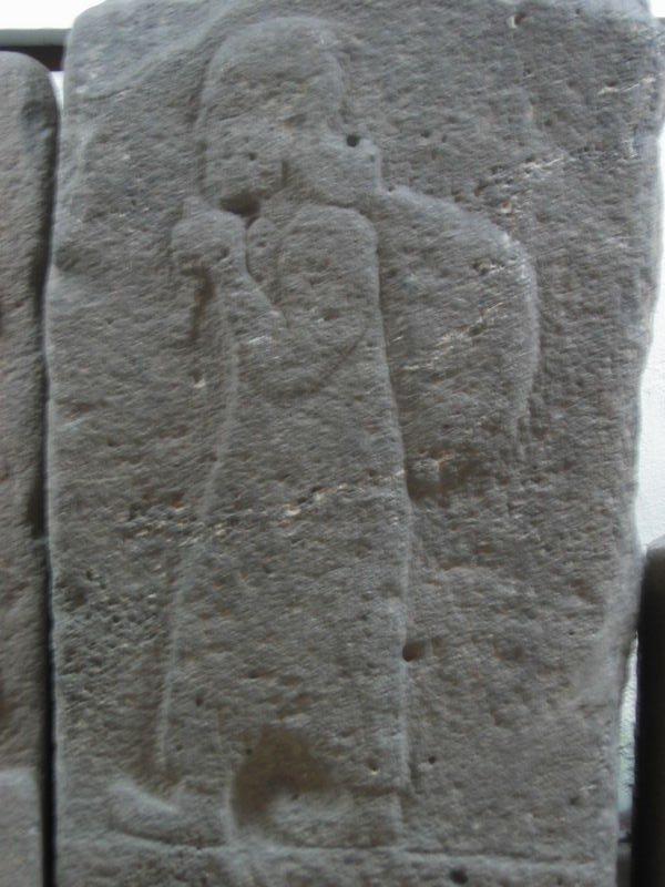 Courrier de l'antiquité